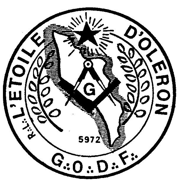 L'Étoile d'Oléron, Loge du Grand Orient de France en pays de Marennes-Oléron.